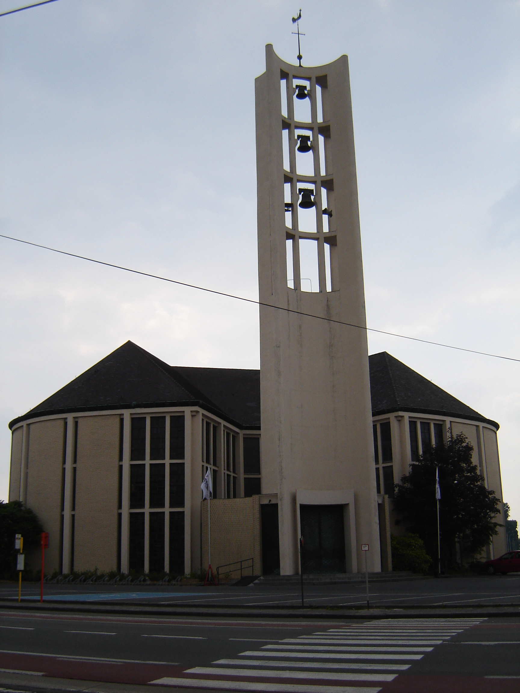 Sint-Jan-Baptistkerk in de wijk Ons Dorp in MenenChurch of the Saint John Baptist in the Ons Dorp quarter in Menen. Menen, West Flanders, Belgium